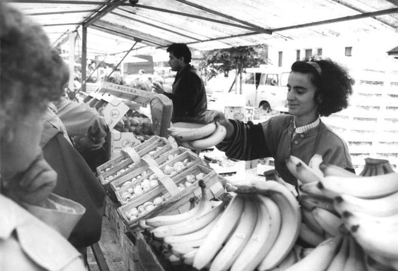 Berlin-Pankow, Markt, türkische Händler ADN-Klaus Franke 25-7-90 Berlin, Belgin Karaca, freundlichen türkische Kleinunternehmerin für Obst und Gemüse auf dem Pankower Wochenmarkt.